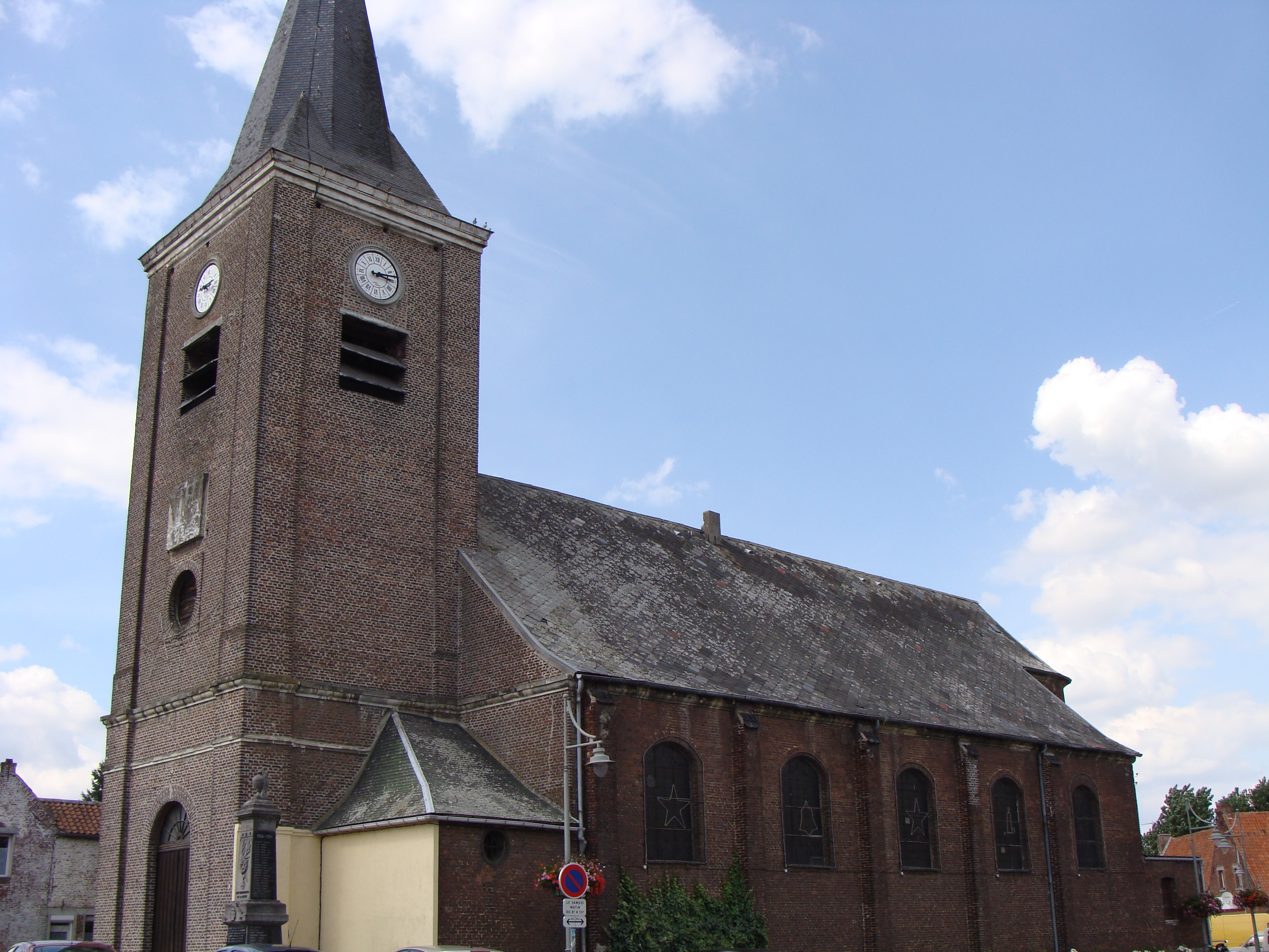 l'église de Beuvry-la-Forêt département du Nord de la France